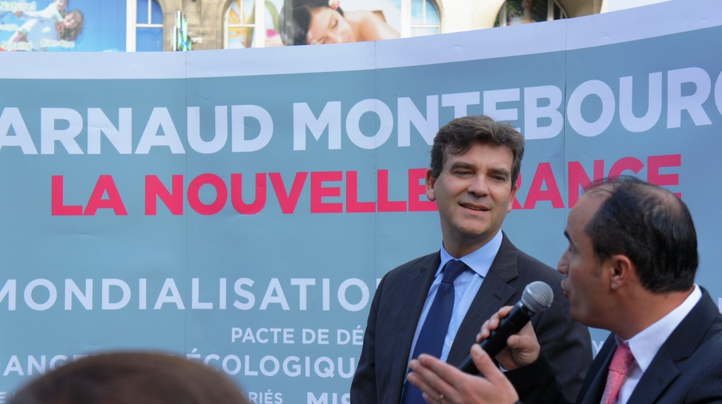 Vue de A. Montebourg lors de sa campagne lanouvelleFrance pour être le candidat de son parti en 2012. Leconseiller général Alexandre Tunc a le micro.